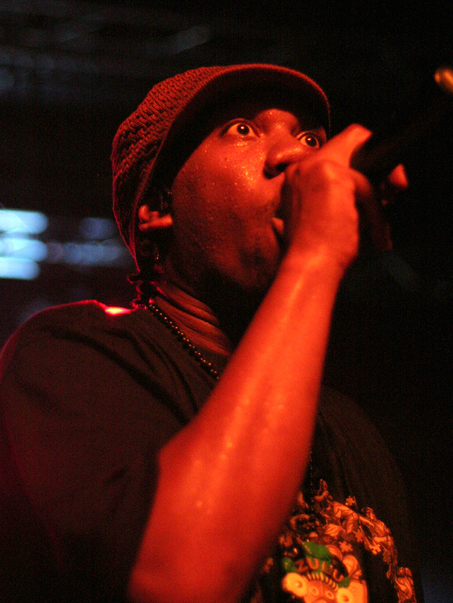 KRS-One performing in Vooruit, Ghent.krs-one